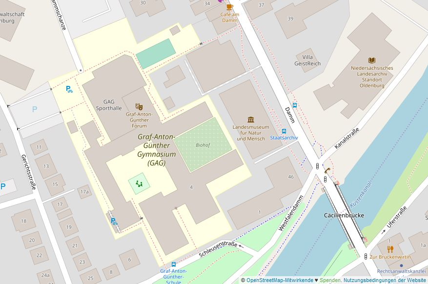 Die Graf-Anton-Günther-Schule (Oldenburg) bei